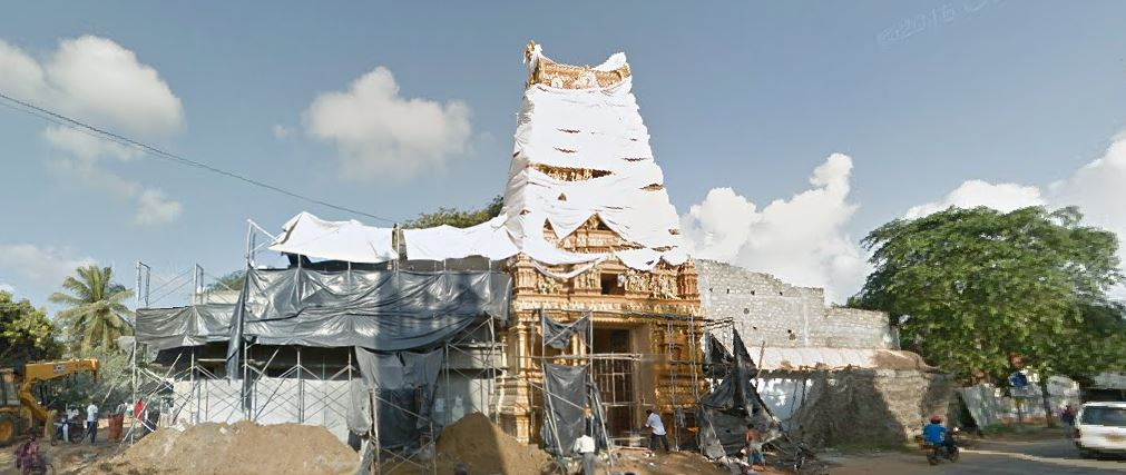 கட்டடநிர்மாணப்பணியின்போது